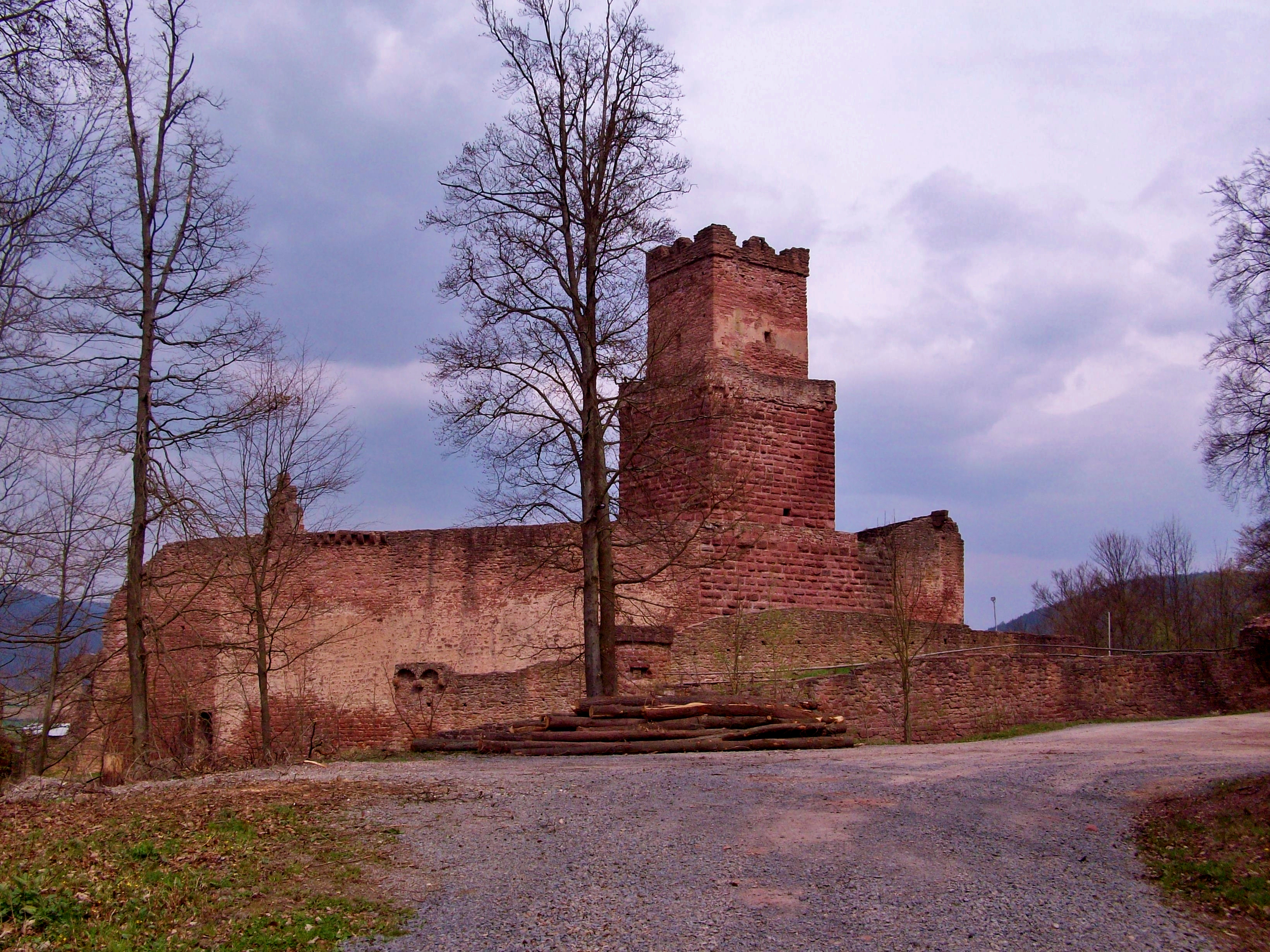 Die Burg Freudenburg mit dem markanten "Butterfass" Bergfried von der Bergseite aus gesehen.